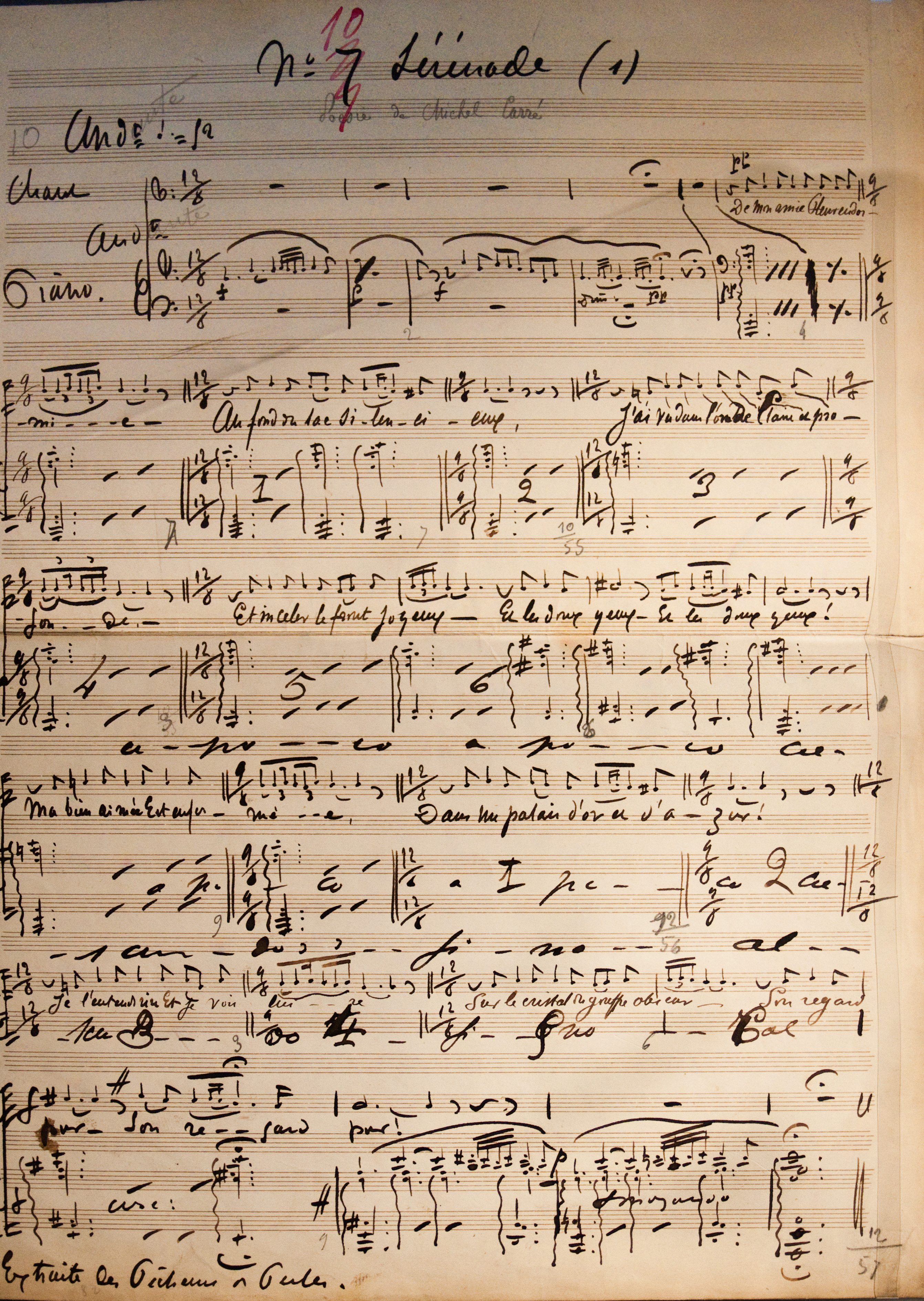 Manuscrit de la Sérénade de Bizet,1874